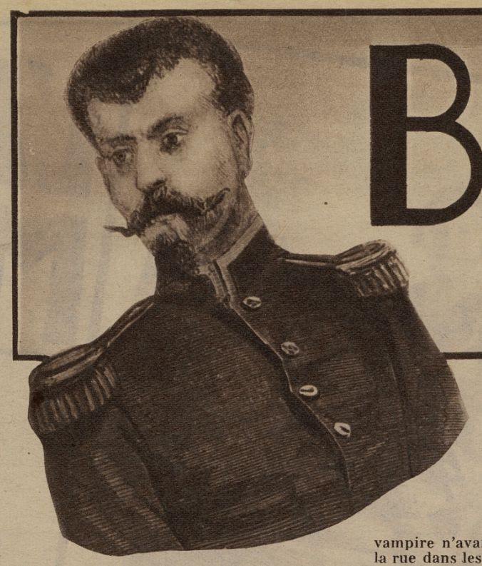 Vue d'artiste du sergent François Bertrand (Détective, n° 410, 3 septembre 1936).